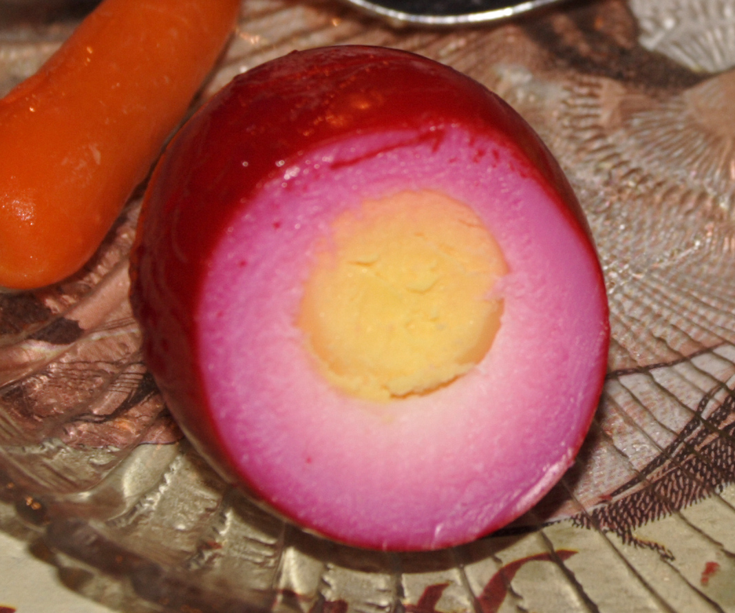 Pickled egg